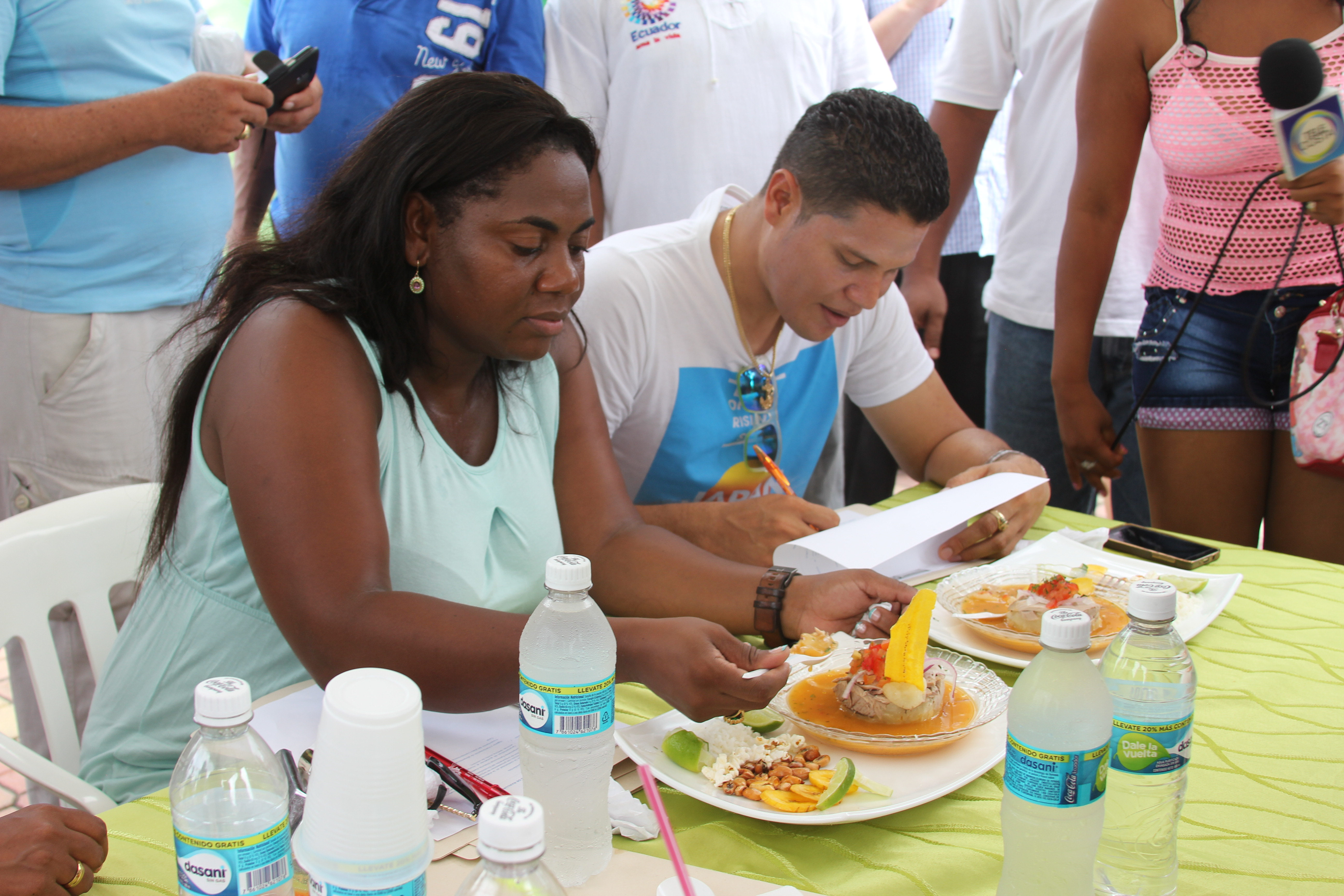 Este 24 de mayo se escogió, entre 12 participantes, el plato que irá a la final del Campeonato del Encebollado.